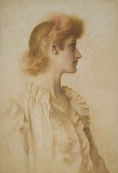 Reginald Barber (British). Portrait of a young girl reputed to be Dorothy Dene, watercolor. Size: 74 x 50 cm. (29.1 x 19.7 in.).